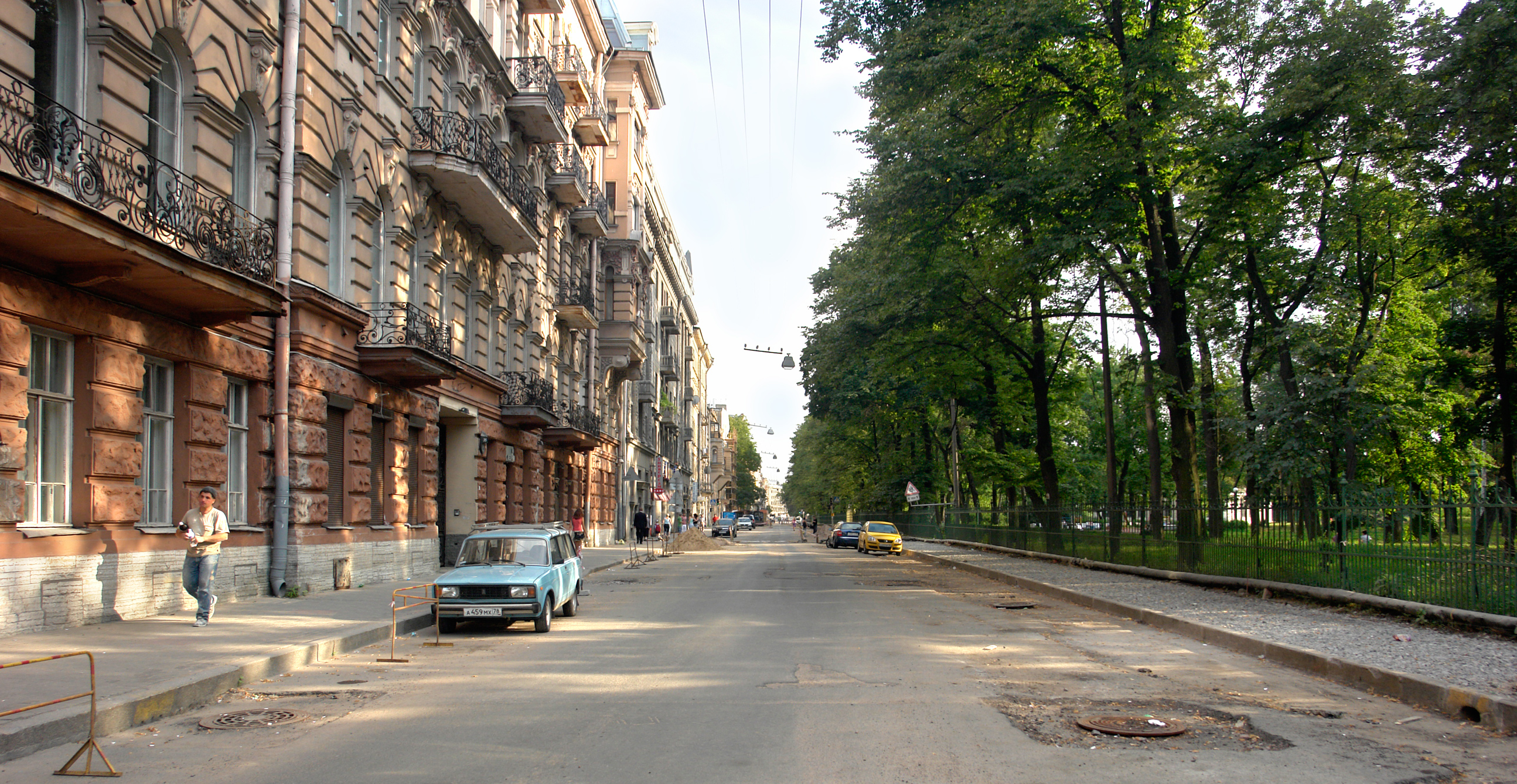 Таврическая улица (Санкт-Петербург), справа Таврический сад.